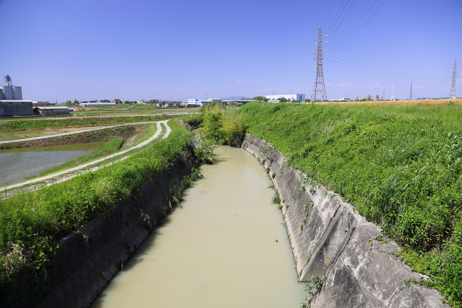 猿渡川（豊田地域文化広場付近、2019年（令和元年）5月）